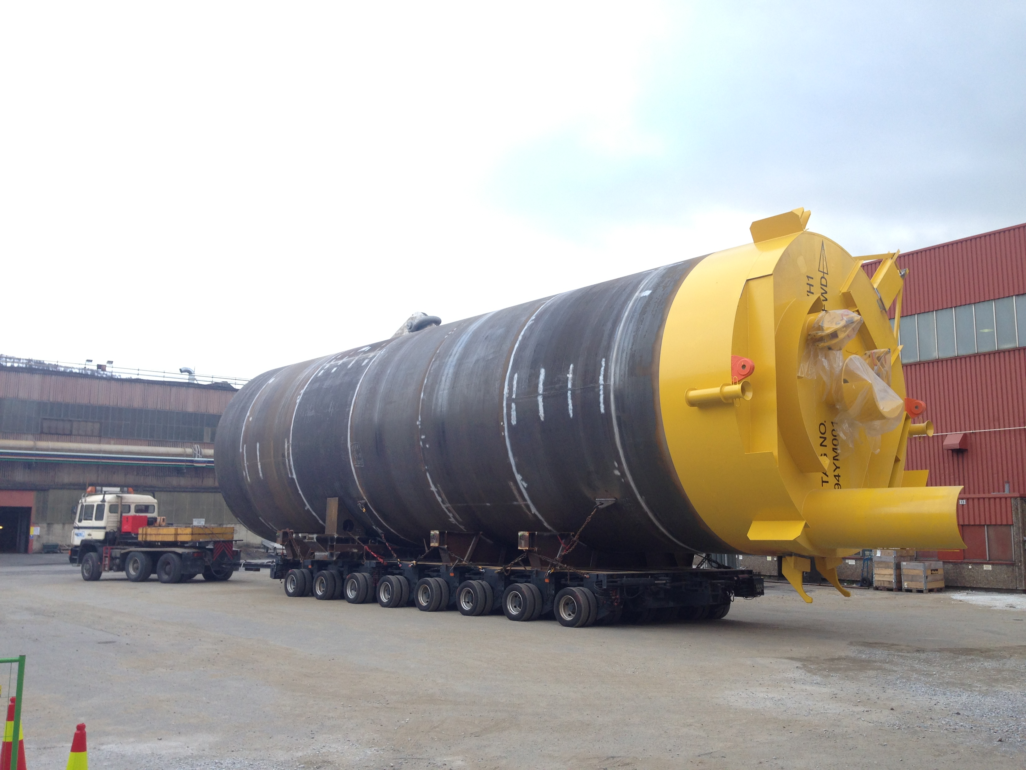 Momek sugeanker